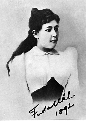 Frida Uhl